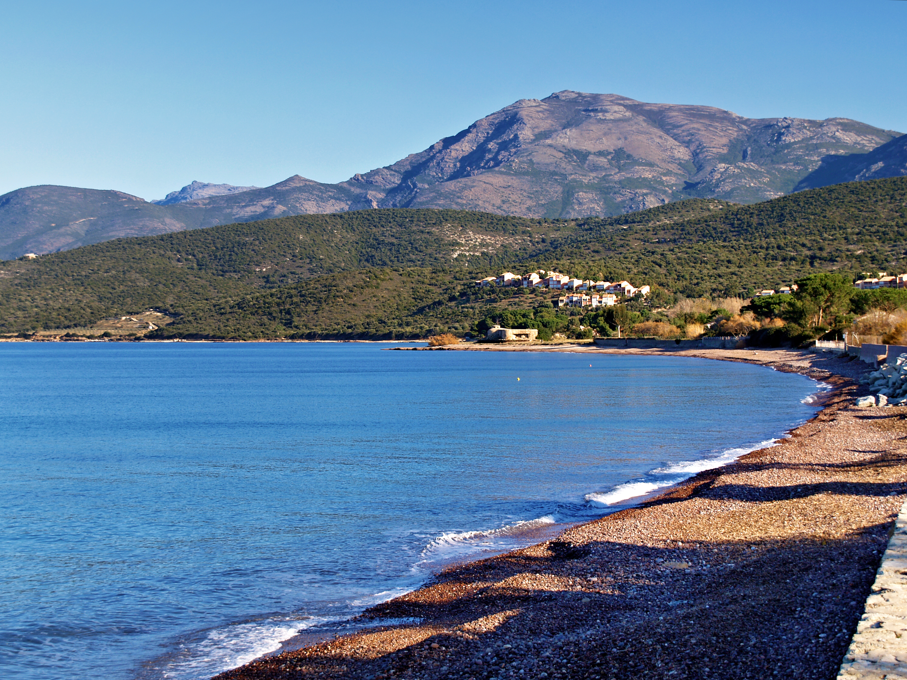 Patrimonio (Corsica) - Les « Marines du Soleil » sous le Pigno (958 m)